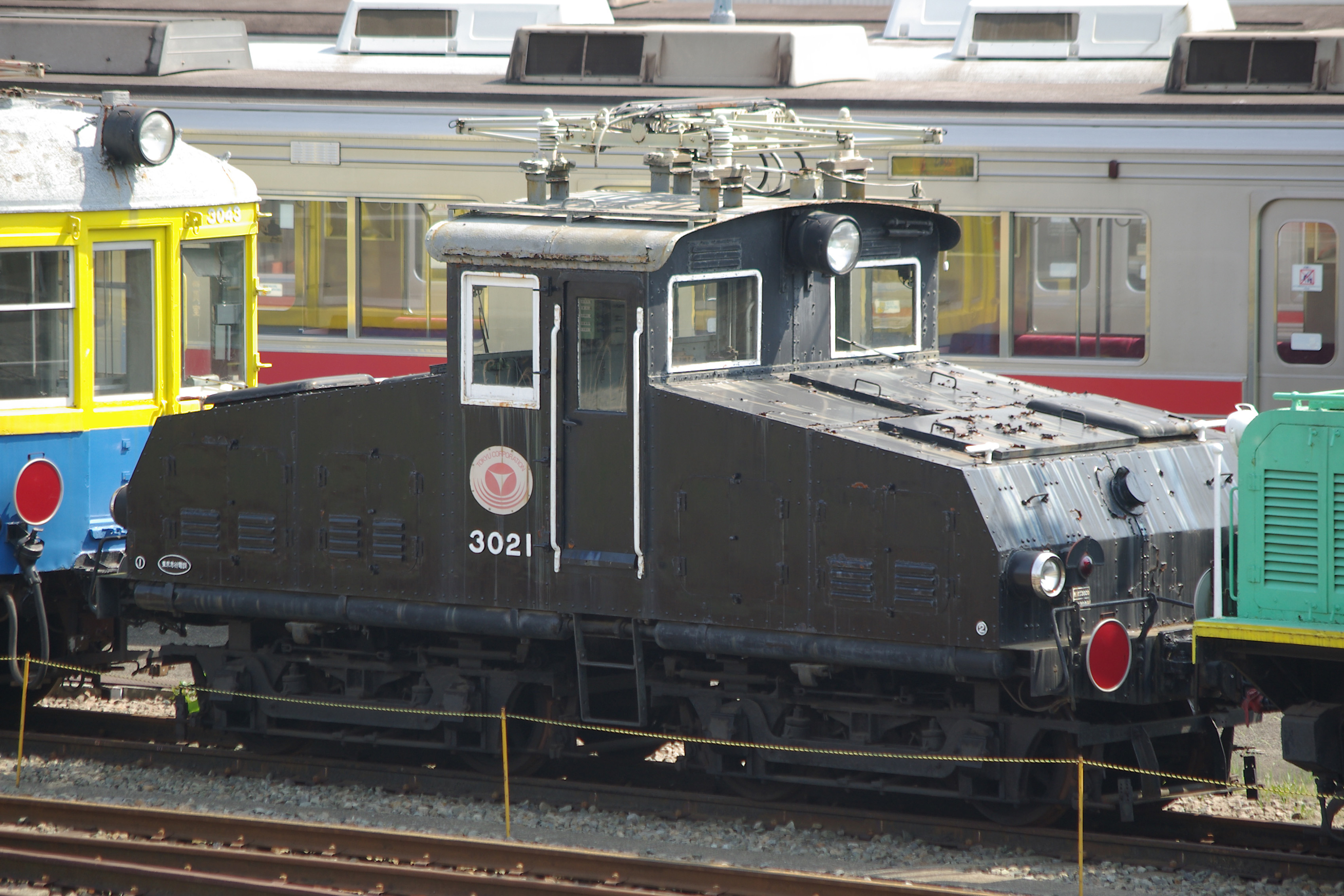 東急デキ3021 (built in 1927) （東京急行電鉄の機関車・貨車）